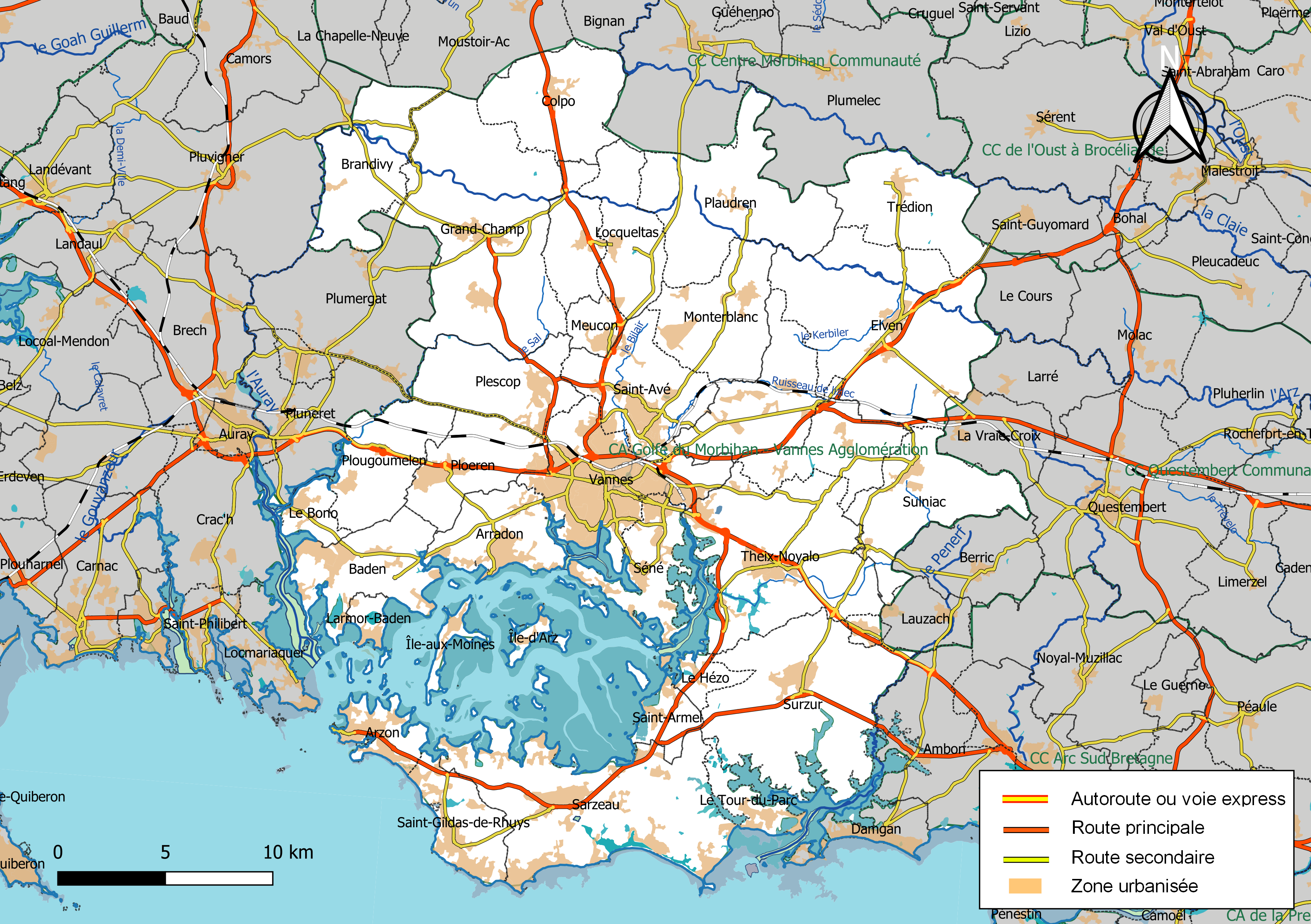 Carte géographique de l'intercommunalité Golfe du Morbihan - Vannes Agglomération, département du Morbihan, France. Composition au 1er janvier 2019.